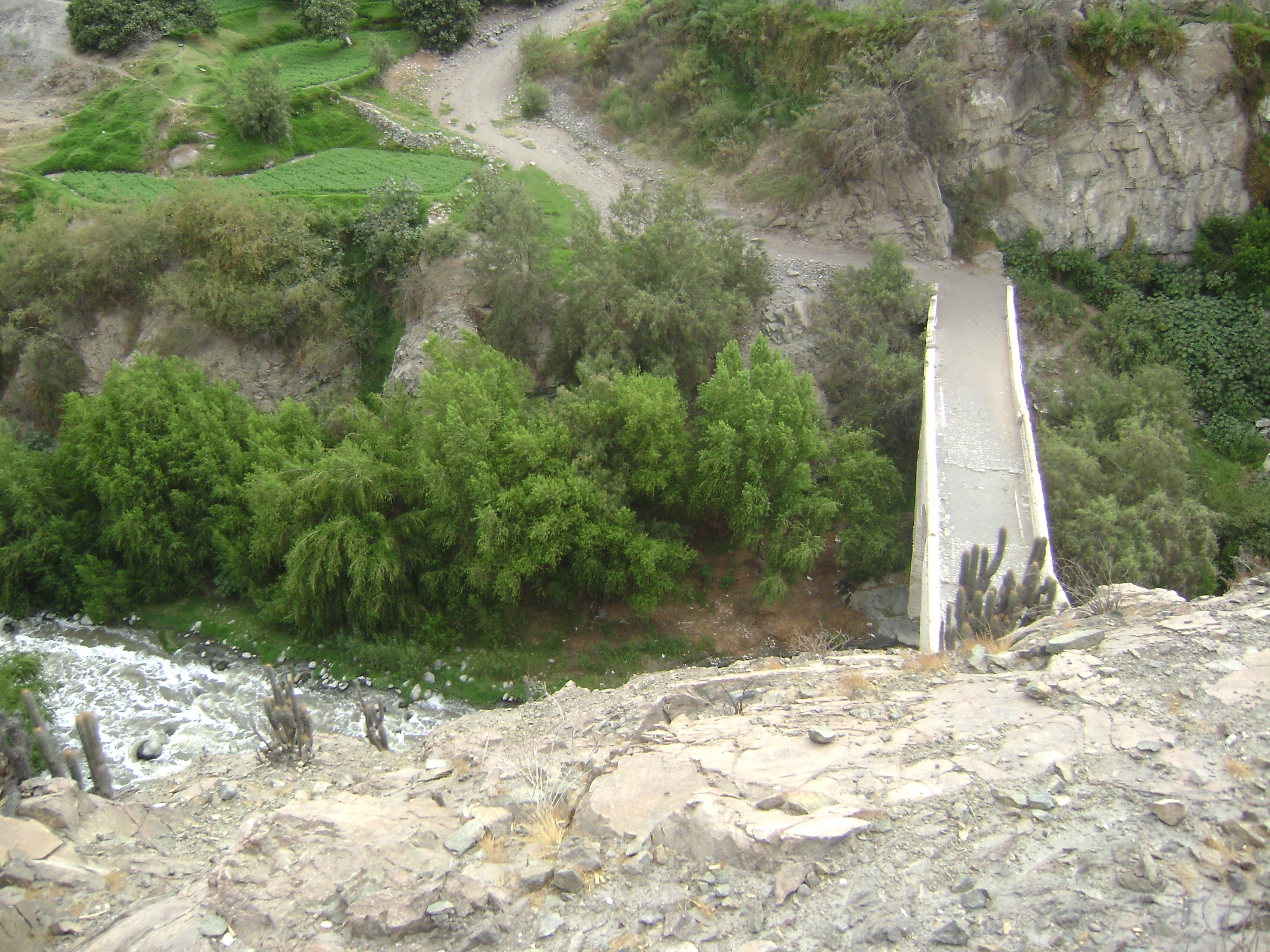 Vista del puente de Uchumayo desde el cerro Salaverry, Perú